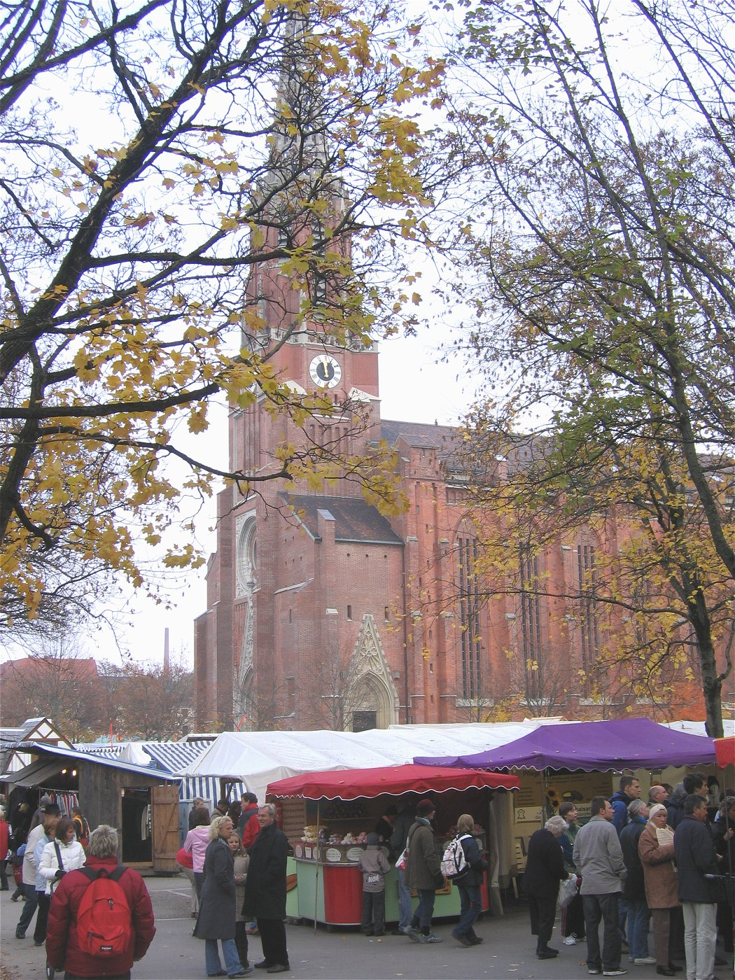 Auer Dult mit Maiahilfkirche in München